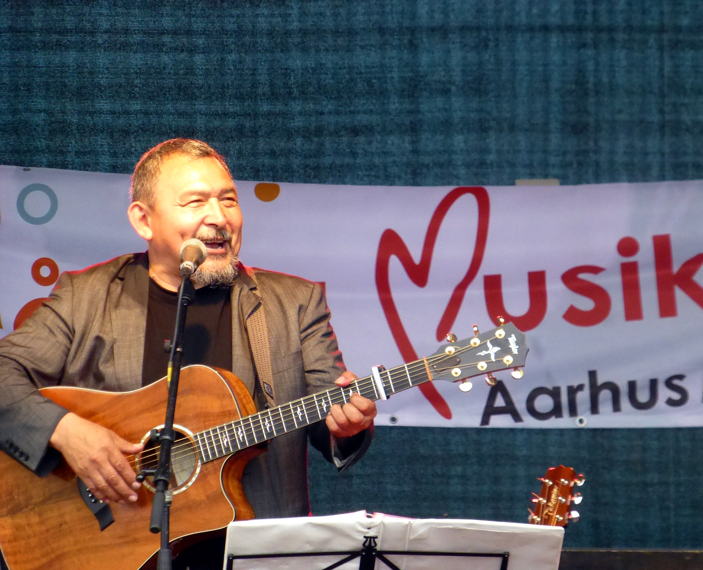 Rasmus Lyberth at Tall Ships' Races in Aarhus 5. july 2013